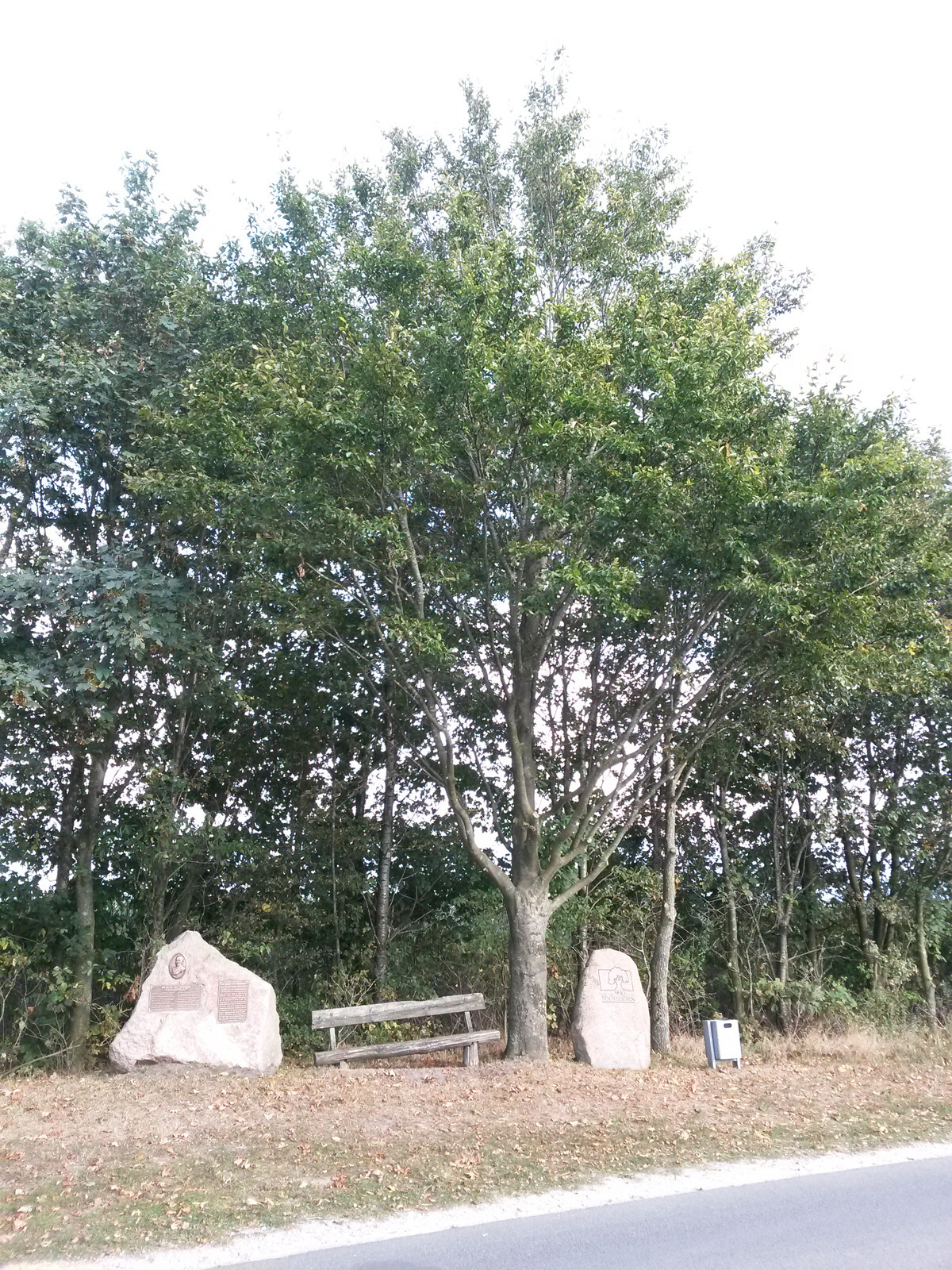 Die Buche von Todtshorn